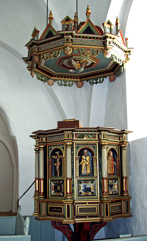 Dover Kirke - Prædikestol Dover Sogn, Hjelmslev Herred, Skanderborg Amt / Århus Amt.